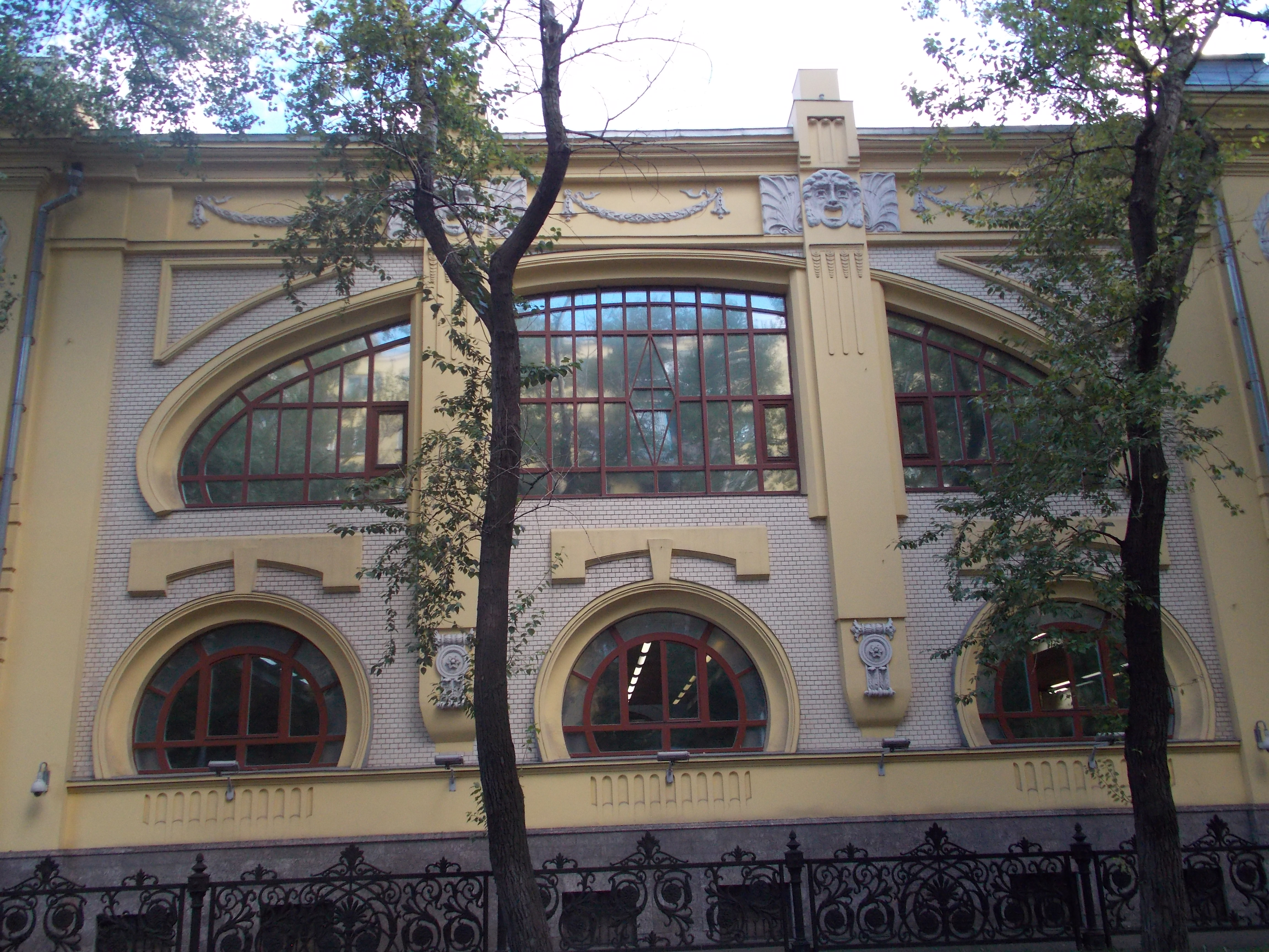 Ресторан Скалкина И. А. «Эльдорадо» (зал, в котором Ленин В. И. выступал в 1918 г. с речью «Советская республика в опасности» (Москва и Московская область, Москва, Красноармейская улица, 1, Серегина улица, 7 ( Красноармейская улица, 3/5))